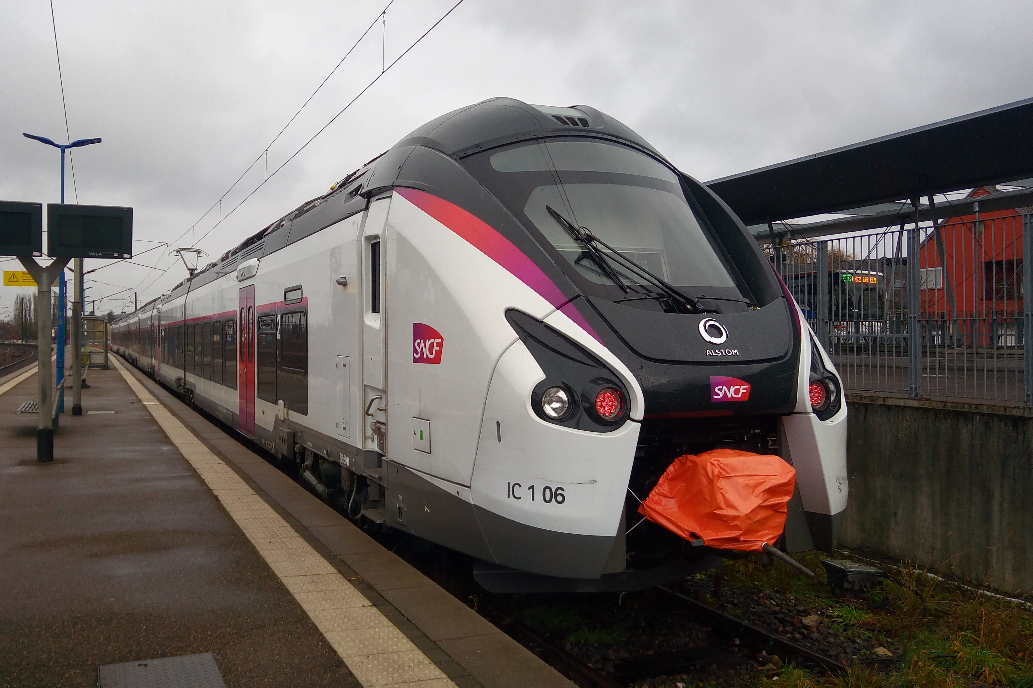 Coradia Liner IC n°106 - ou SNCF Class B 85000, en gare de Saverne en 2017